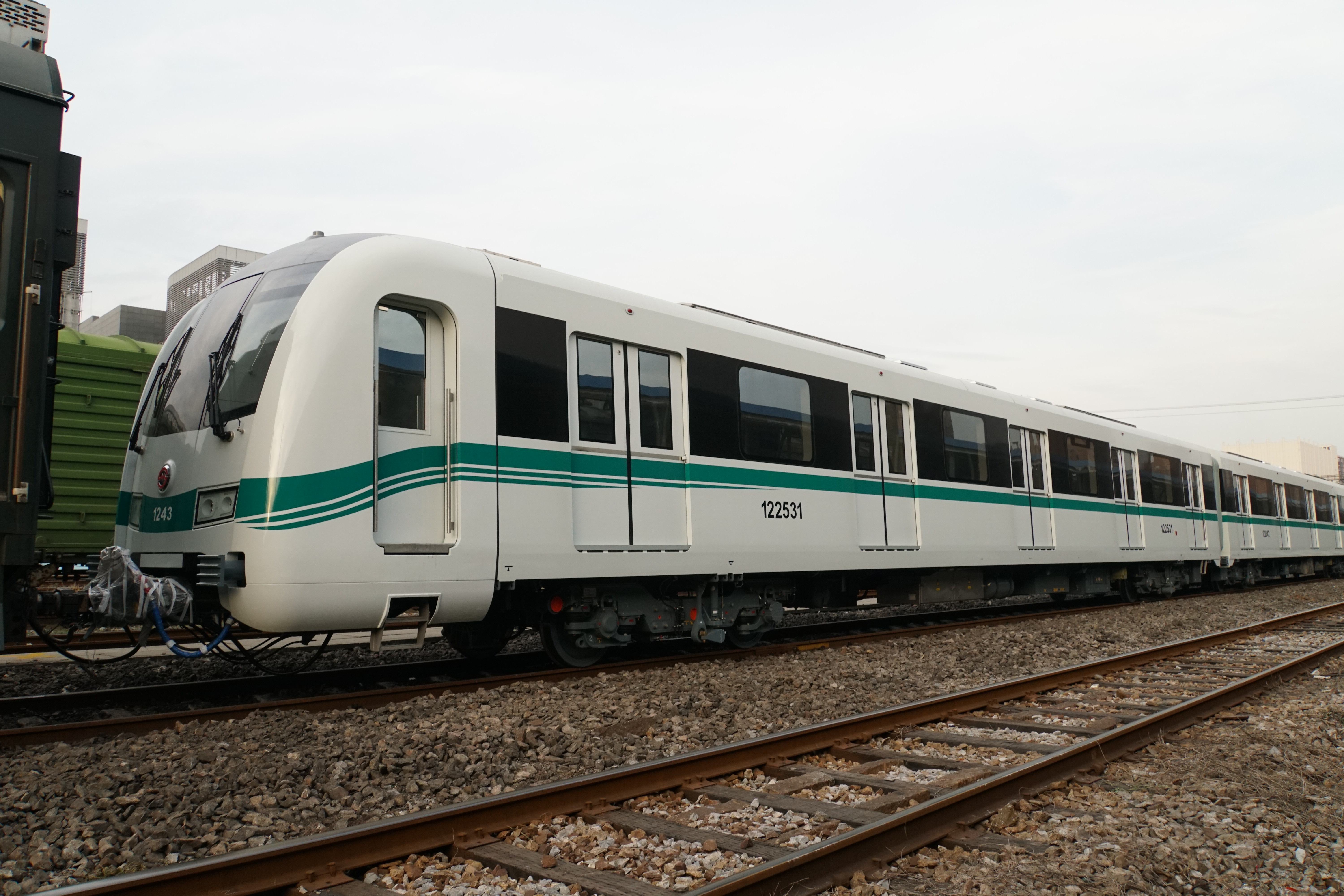 停靠于北郊站的12A02型列车